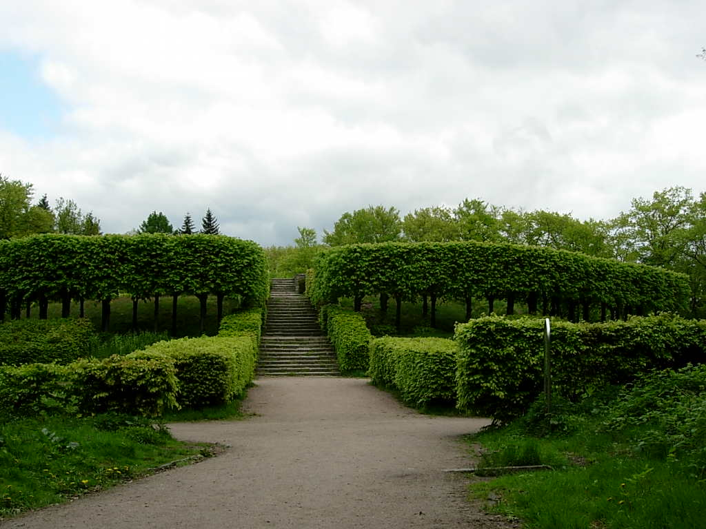 Tutenberg, ein symmetrisch angelegter Hügel im Altonaer Volkspark